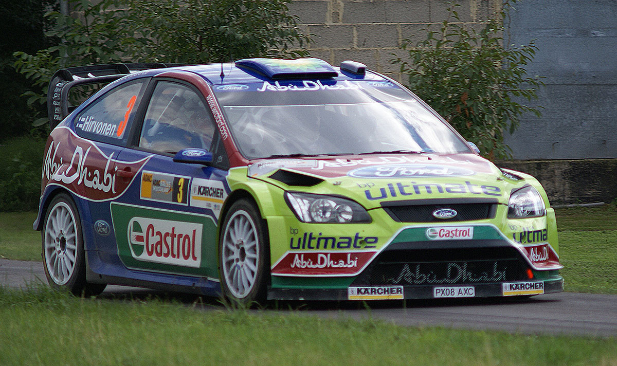 M. Hirvonen / J. Lethinen, Ford Focus RS, Rallye Deutschland 2008